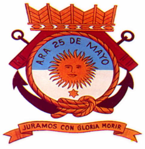 Escudo portaaviones PAL ARA Veinticinco de Mayo (V-2), POMA